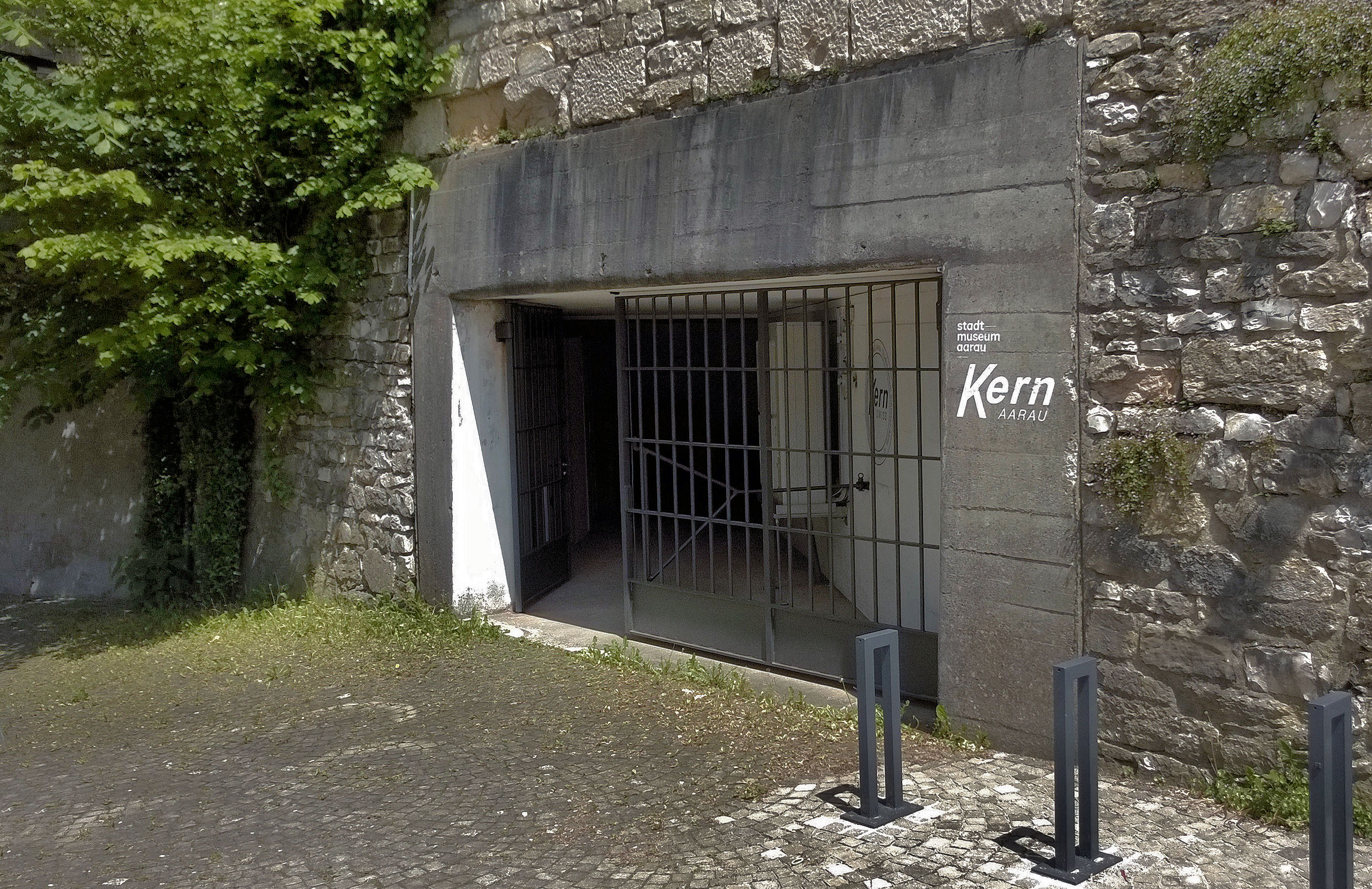 Eingang zur Studiensammlung Kern am Schlösslirain, Aarau